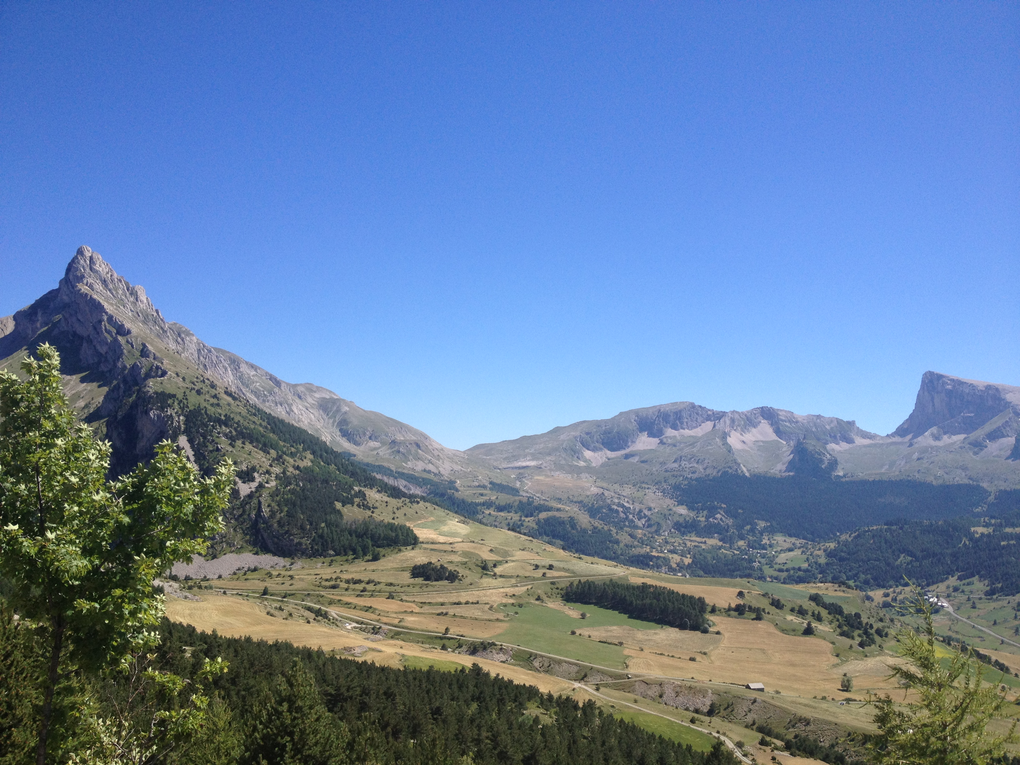 Vue panoramique de la partie Est du Dévoluy, à droite les arrêtes de Truziaud, au centre le col de Rabou et à droite le Pic de Bure.